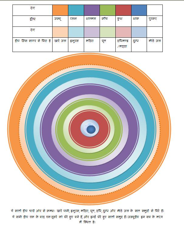 पृथ्वी के द्वीपों और सागरों की स्थिति